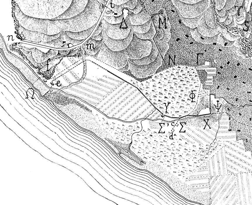 Plan du port de la ville antique de Séleucie de Piérie, tiré d'un ouvrage de plus de 70 ans, donc déchu des droits d'auteurs.